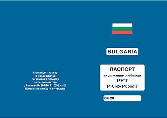 Български модел на паспорт на домашен любимец.